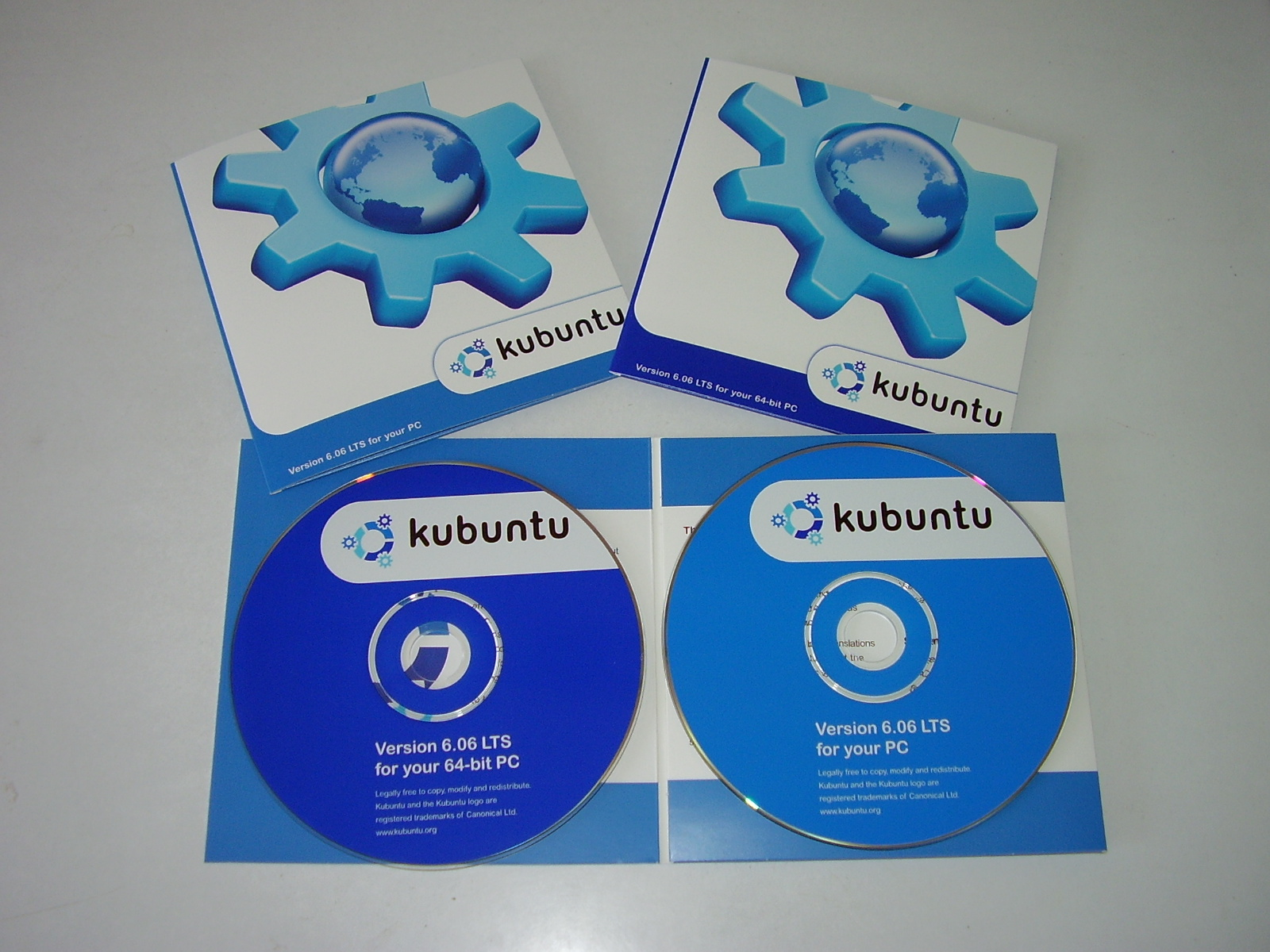 I Kubuntu CDovi su dostupni potpuno besplatno.